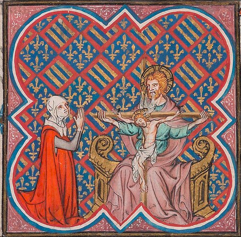 Blanche de Bourgogne (1288-1348)